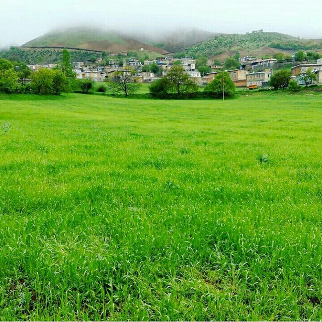 دشت زیبای تخت زنگی(بله ای) در دامنه های زرنه در بهار 1396